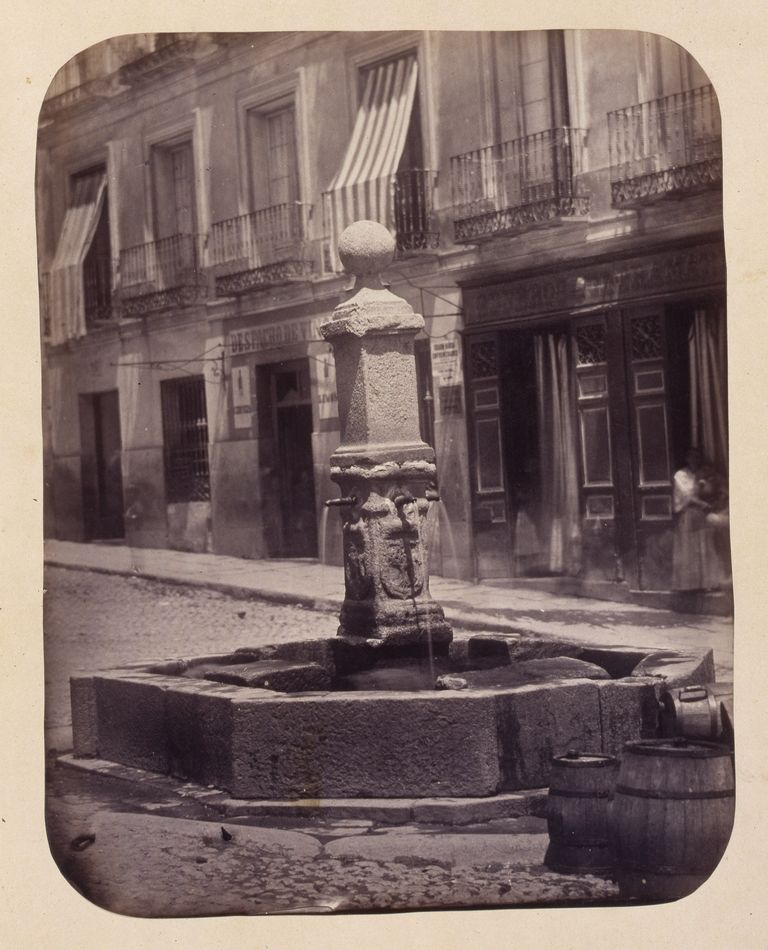 Fuente en la calle de Santa Isabel de Madrid. Obra en 1864 del fotógrafo toledano Alfonso Begué, muerto el 31 de octubre de 1865. Cartulina sepia. Albúmina. 43 x 32 cm. Fotografía contenida en un álbum procedente del Archivo de Villa y trasladado al Museo de Historia en 1983.